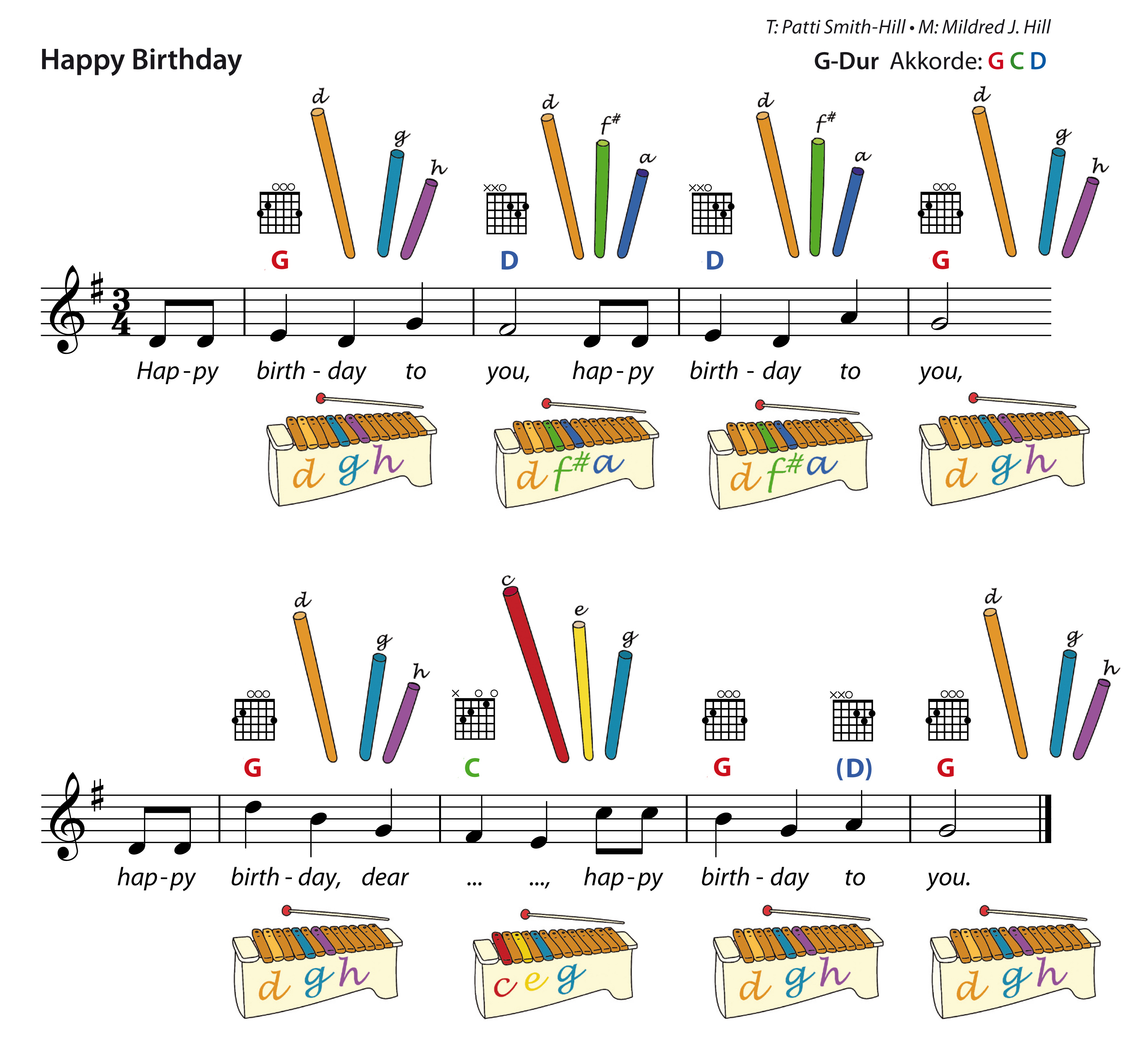 Akkorde für Happy Birthday